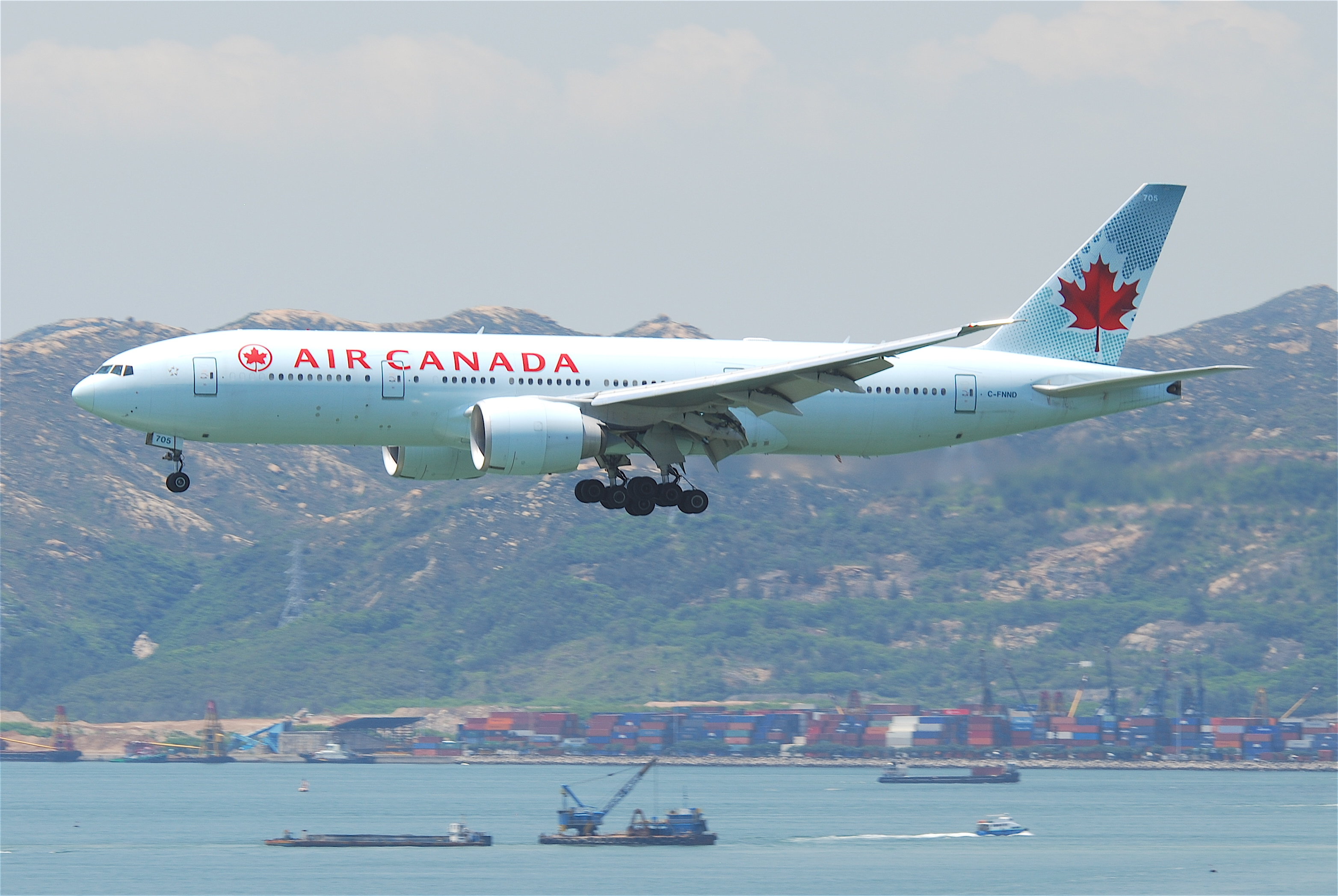 Air Canada Boeing 777-200LR; C-FNND@HKG;04.08.2011/615om